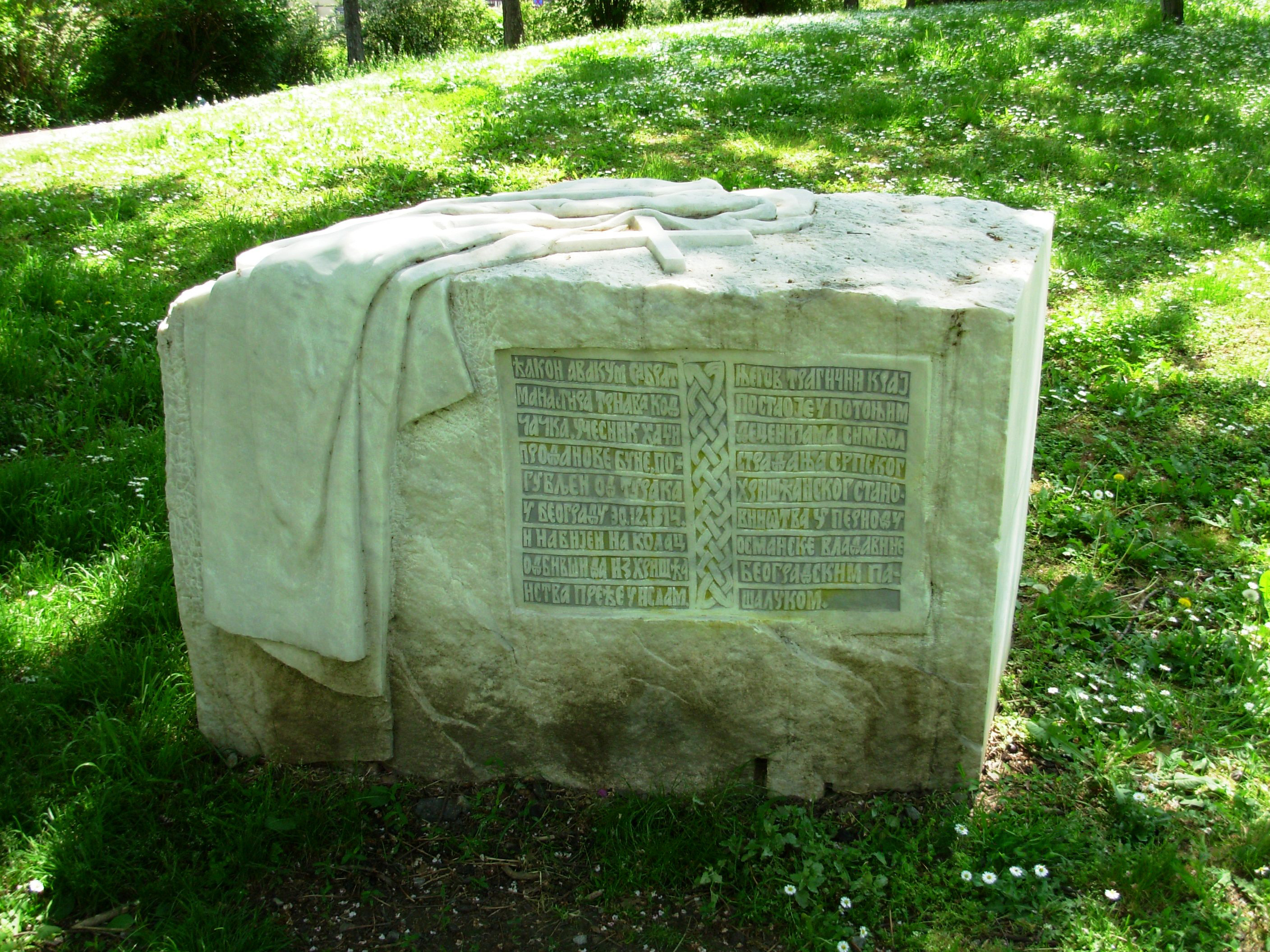 Споменик ђакону Авакуму на Калимегдану, Београд, Србија. Сликао Голдфингер